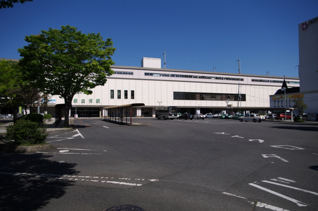 東日本旅客鉄道東北本線、東北新幹線新白河駅